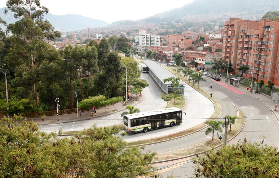 Estación Palos Verdes (Metroplus)